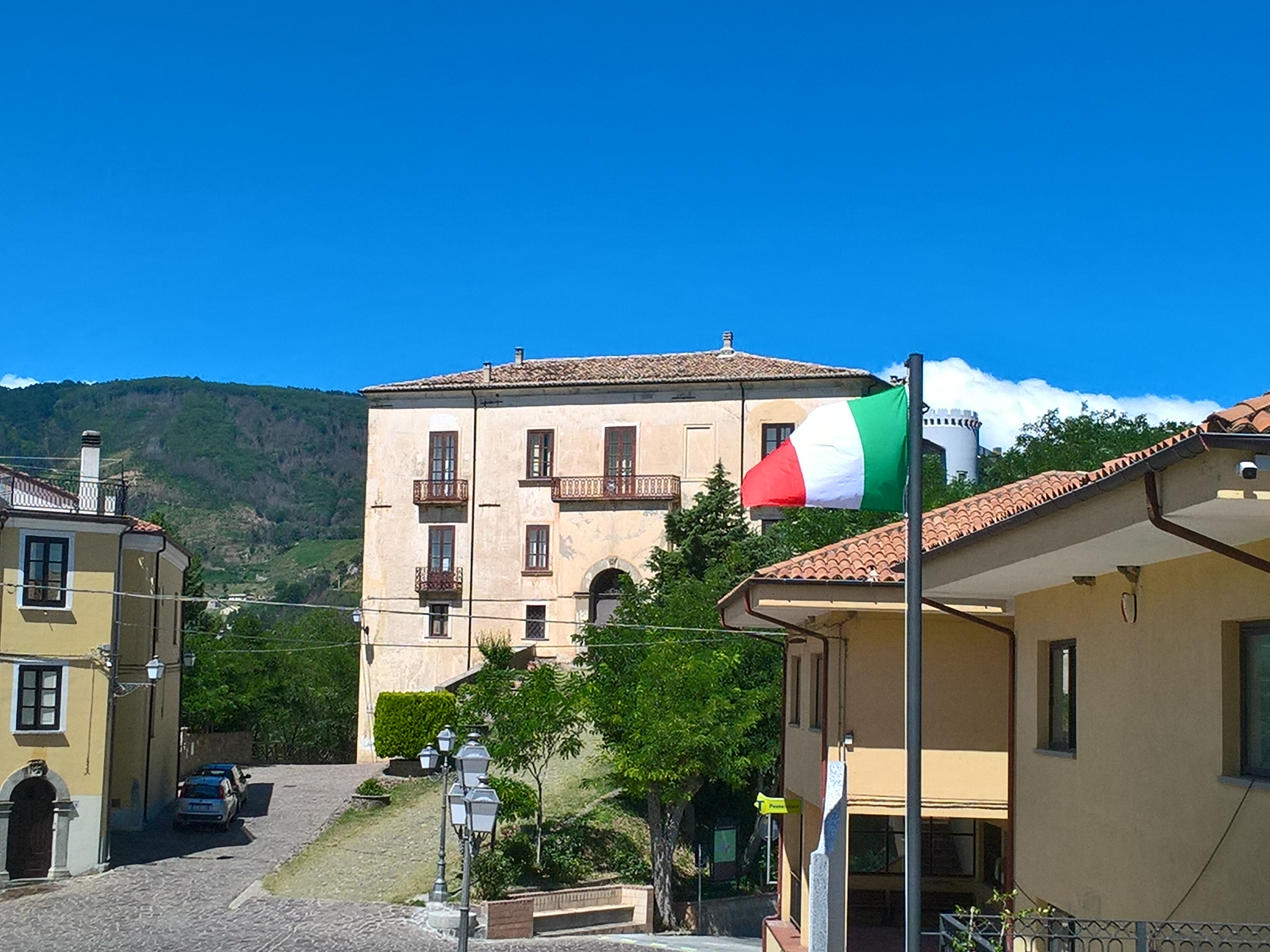 Palazzo Guzzolino visto dalla chiesa San Nicola di Bari